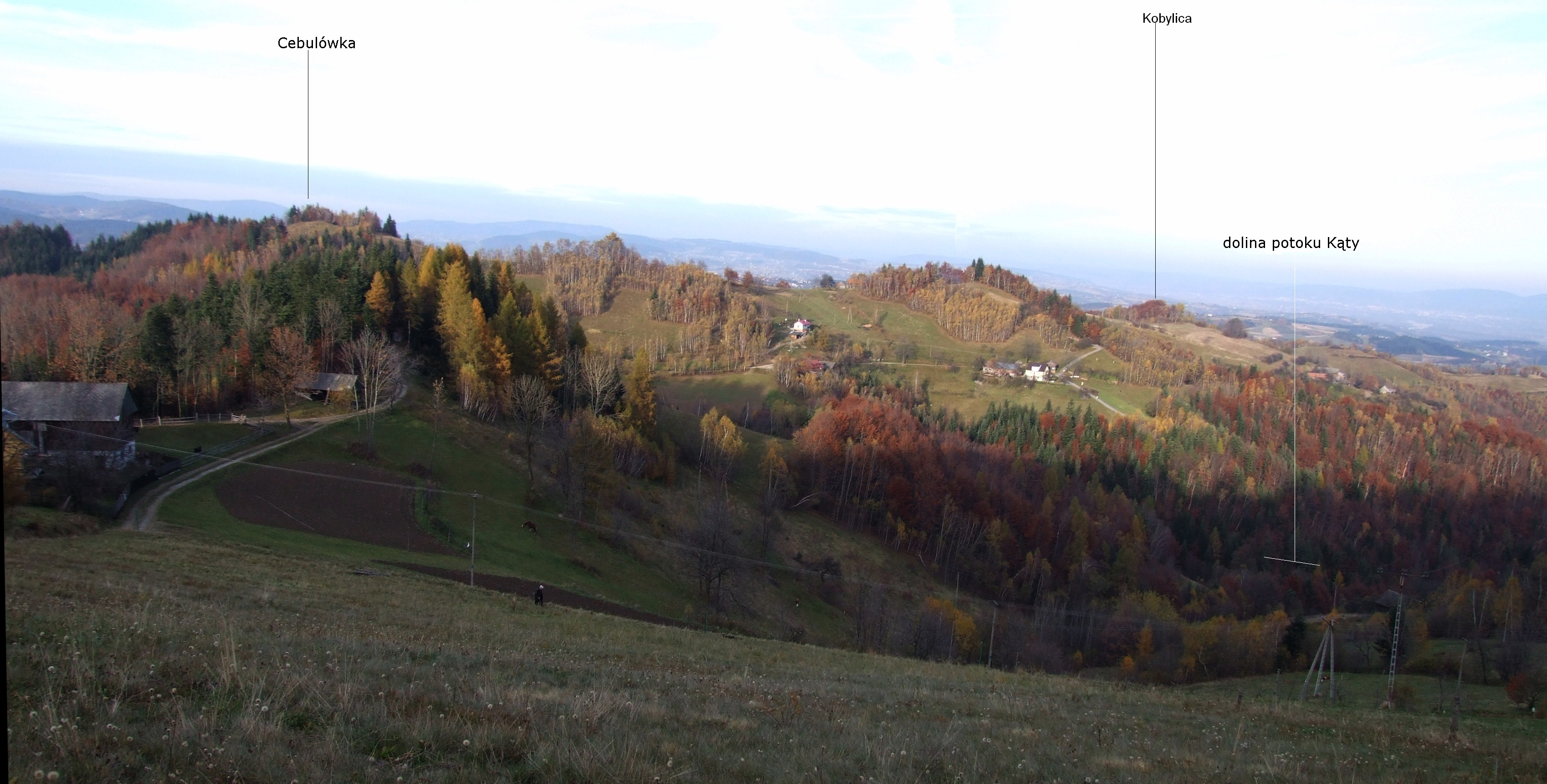 Cebulówka i Kobylica w Paśmie Radziejowej (miejscowość Brzyna)